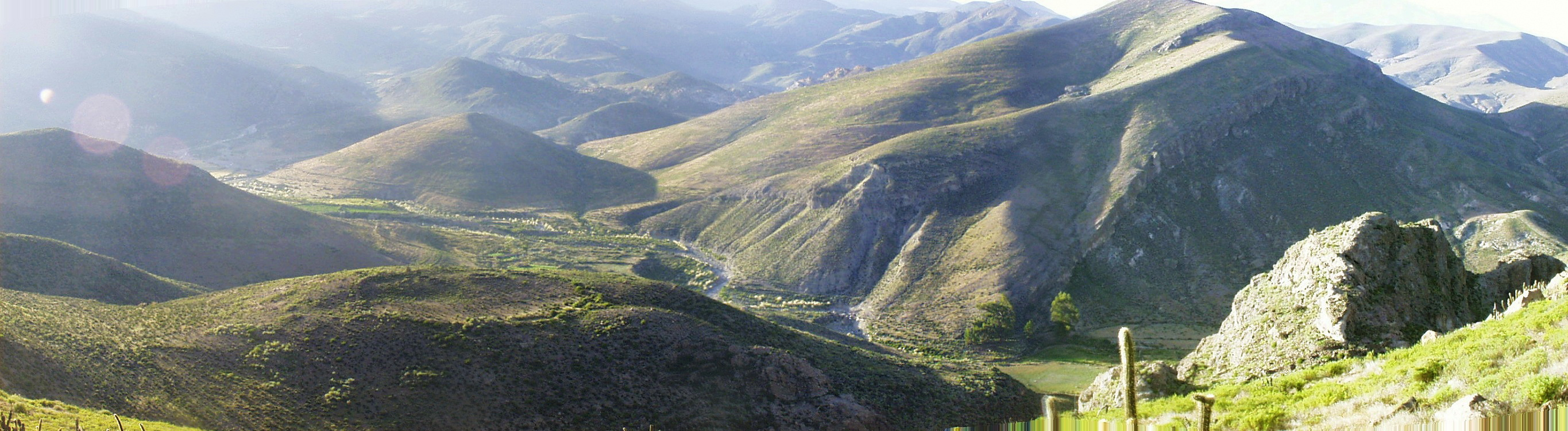 Pucará de Belén o Huaihuarani e Incahullo This is a photo of a national monument in Chile: 260